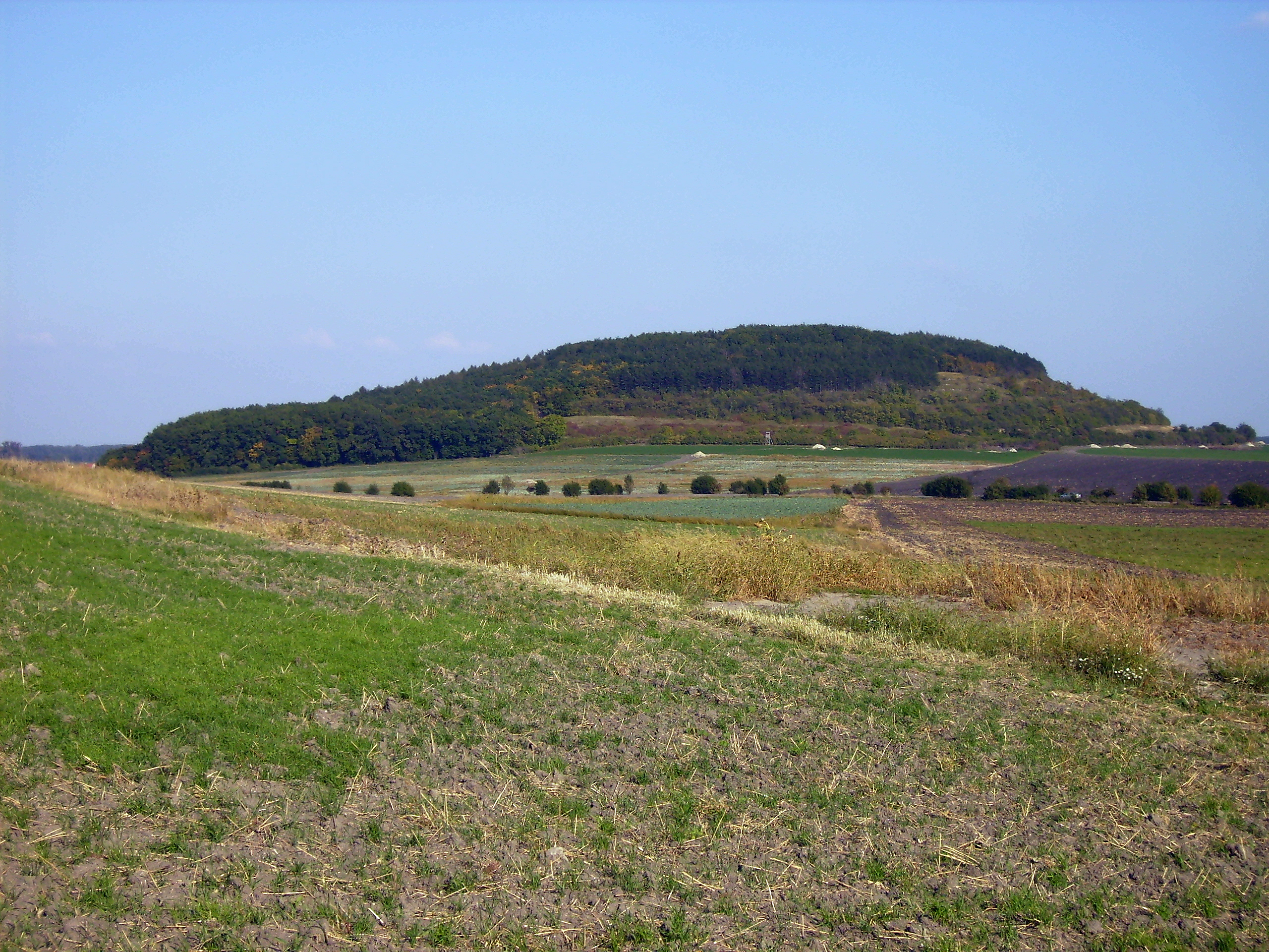 Semicka hura fotografovana z Prerovske hury.